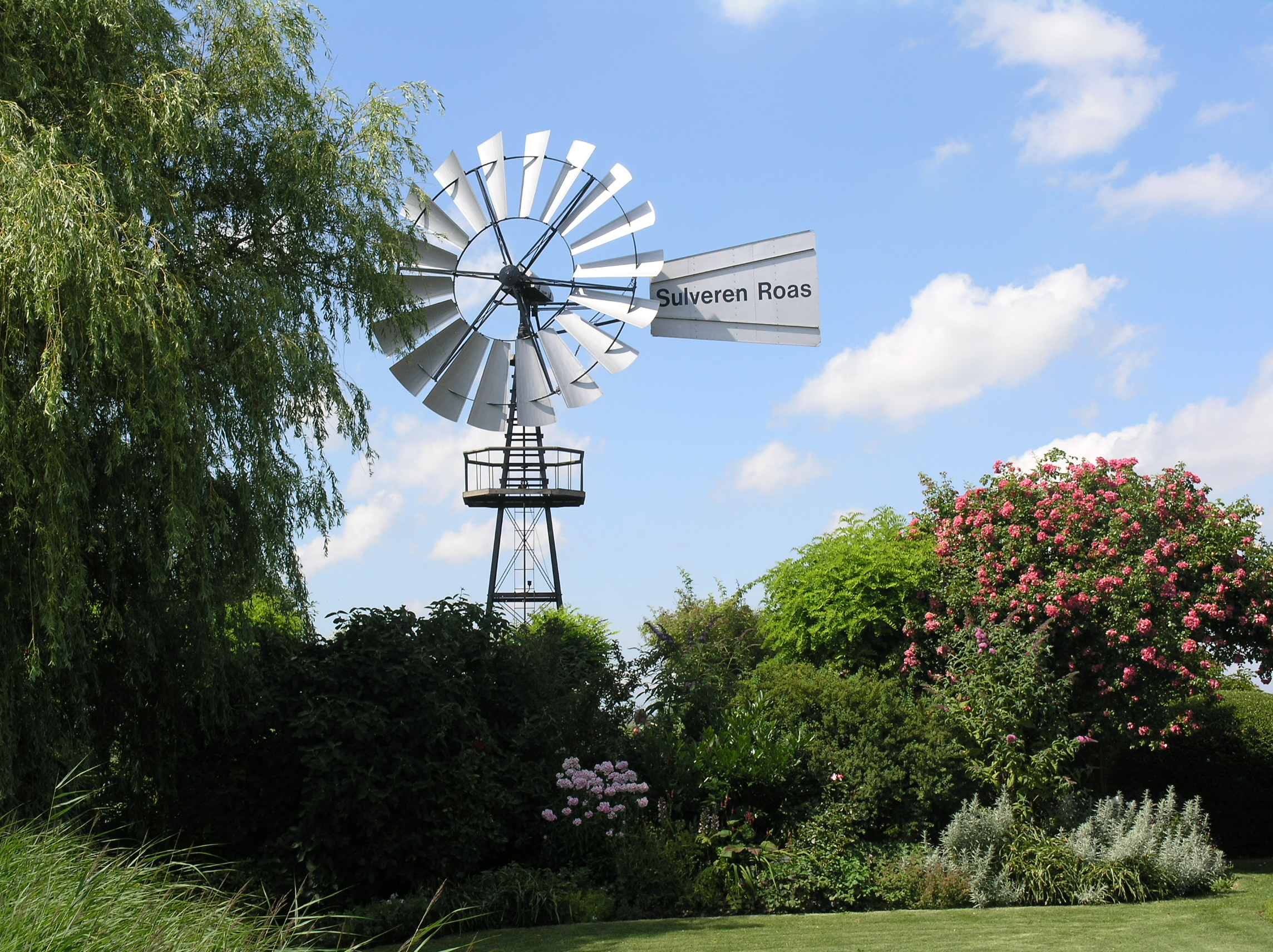 Oosterlittens Windmotor Sulveren Roas